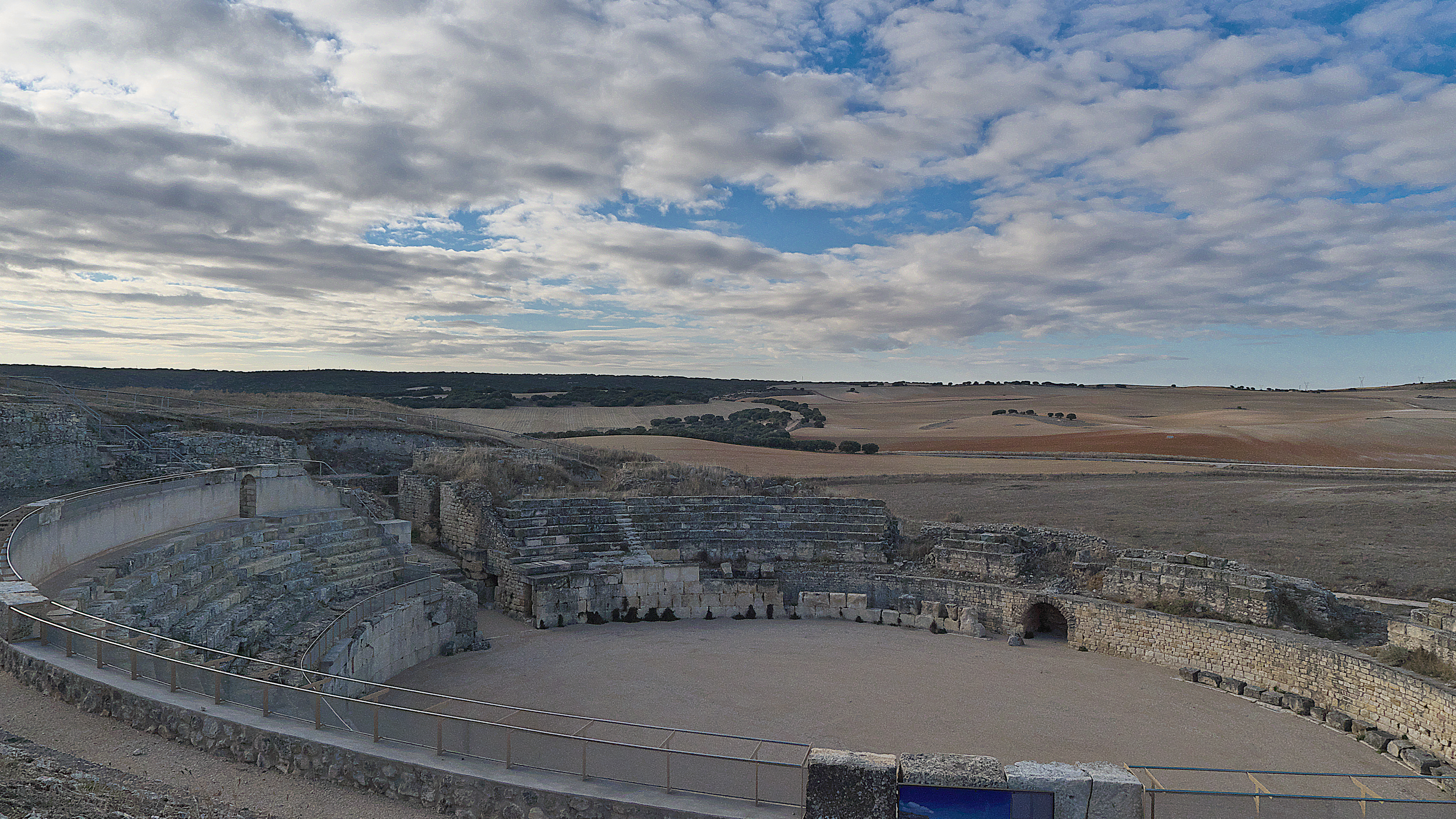 El anfiteatro de Segóbriga, Saelices (Cuenca), (s. II a. de C.) tenía capacidad para 5.500 personas.